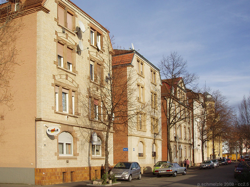 Happelstraße in Heilbronn, mit denkmalgeschütztem Bestand an historischen Arbeiterwohnungen